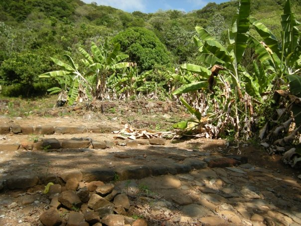 Détail des vestiges archéologiques de l'habitation Artur